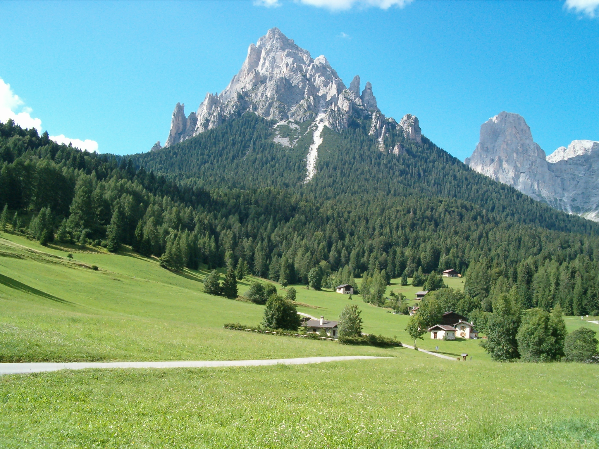 Prati Piereni ai piedi del Monte Cimerlo (Gruppo Pale di San Martino), Primiero, Trentino